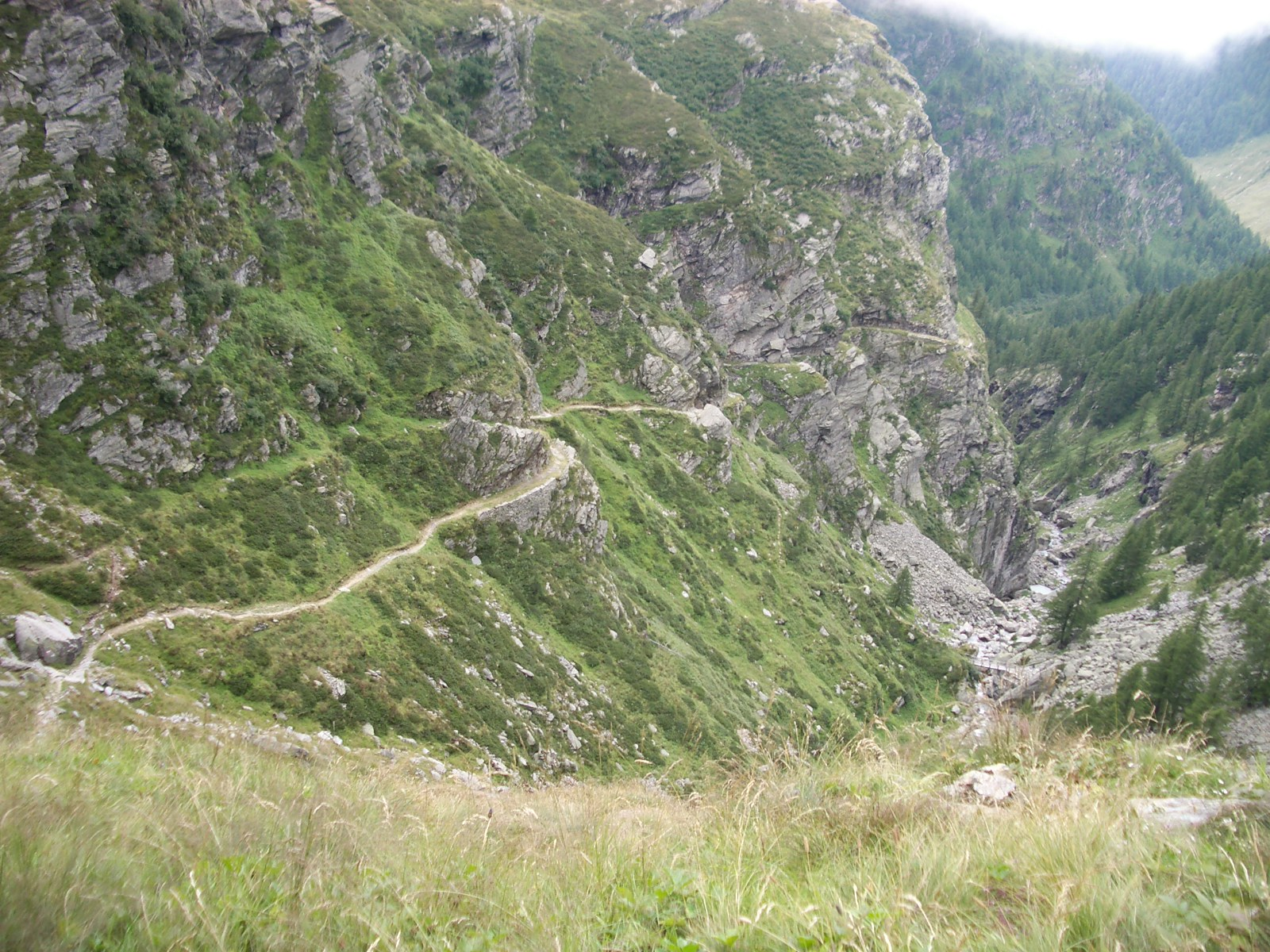 Cardinello gorge, Italy